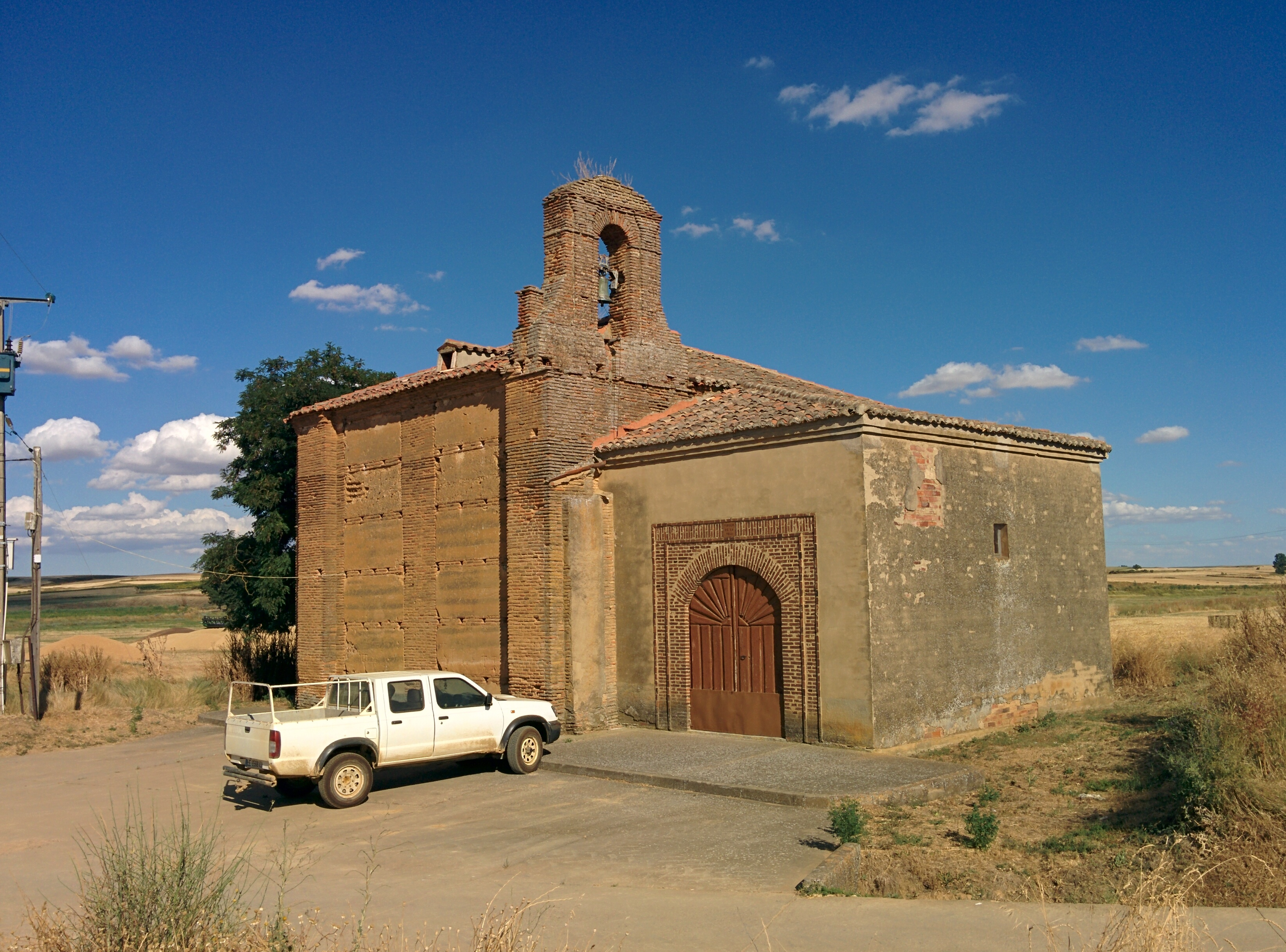 Ermita de Nuestra Señora de la Vega, en Escobar de Campos (León, España).